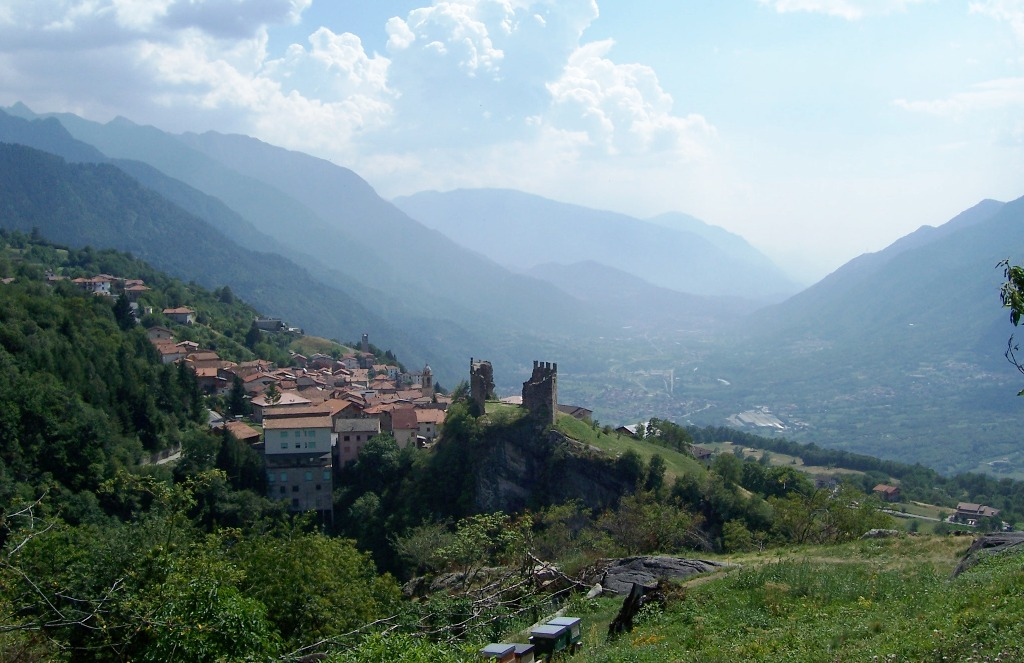 Panorama of Cimbergo with its castle. Val Camonica, Italia